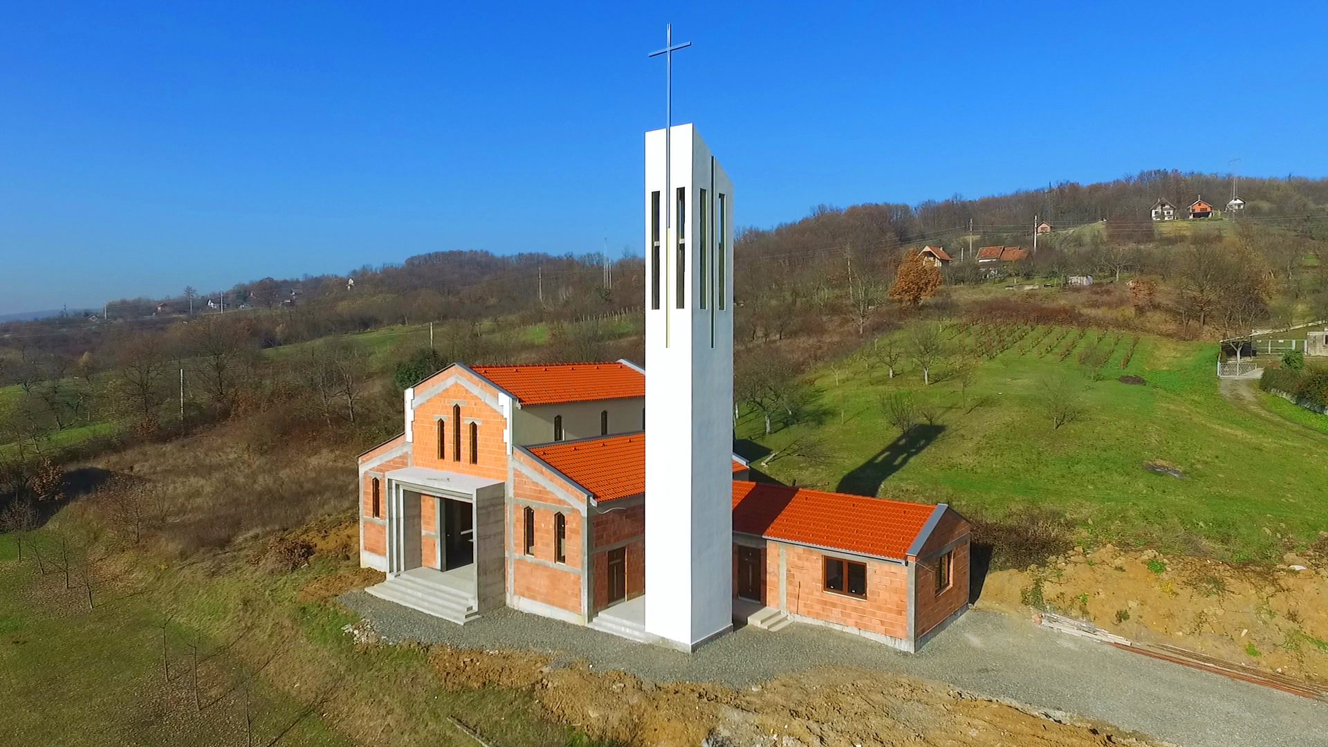 BARTOLOVCI